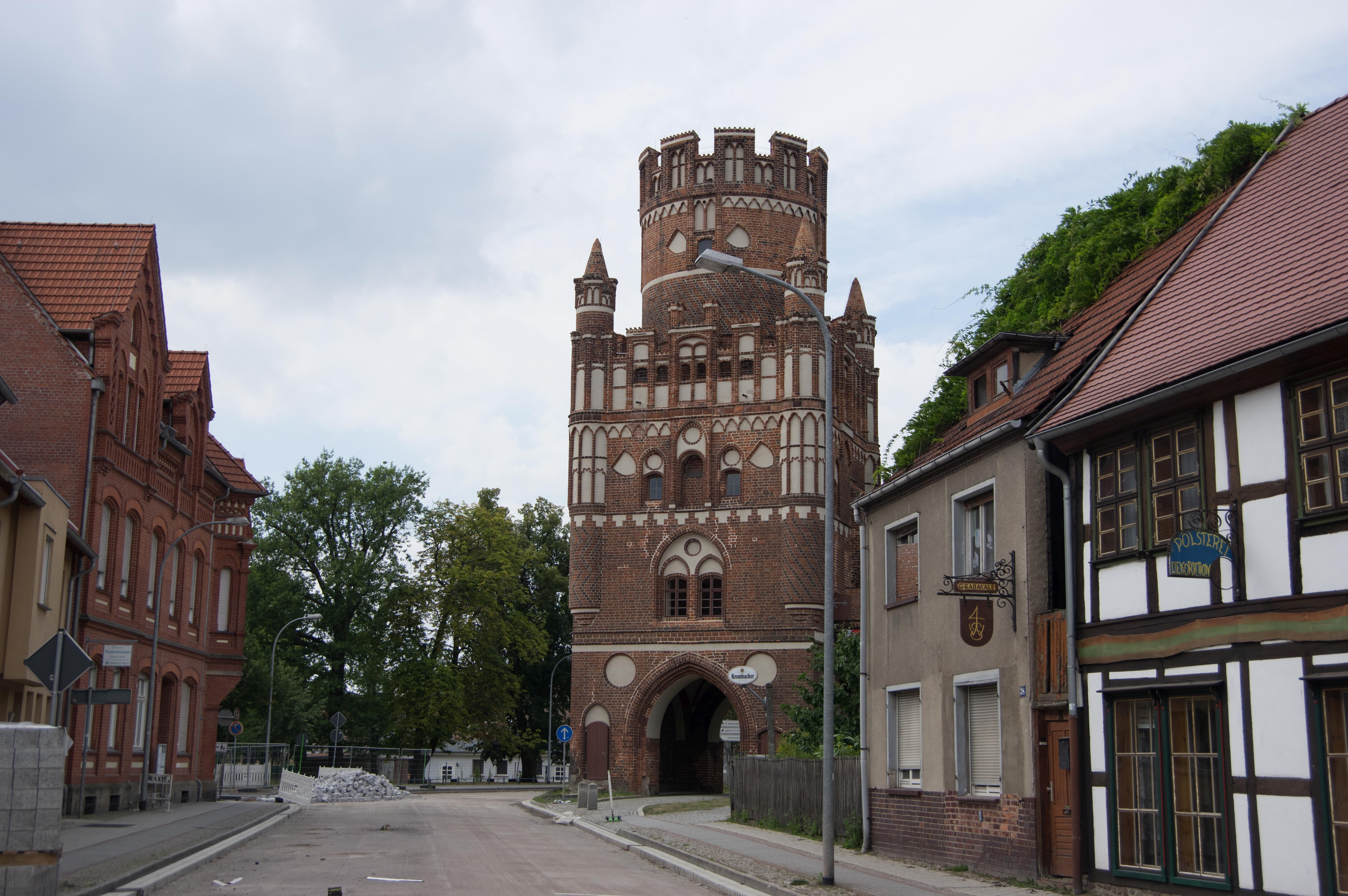 Stendal in Sachsen-Anhalt. Das Tor ist Teil der Stadtmauer. Der Fotograf steht in der Straße Altes Dorf. Das Tor sit denkmalgeschützt.